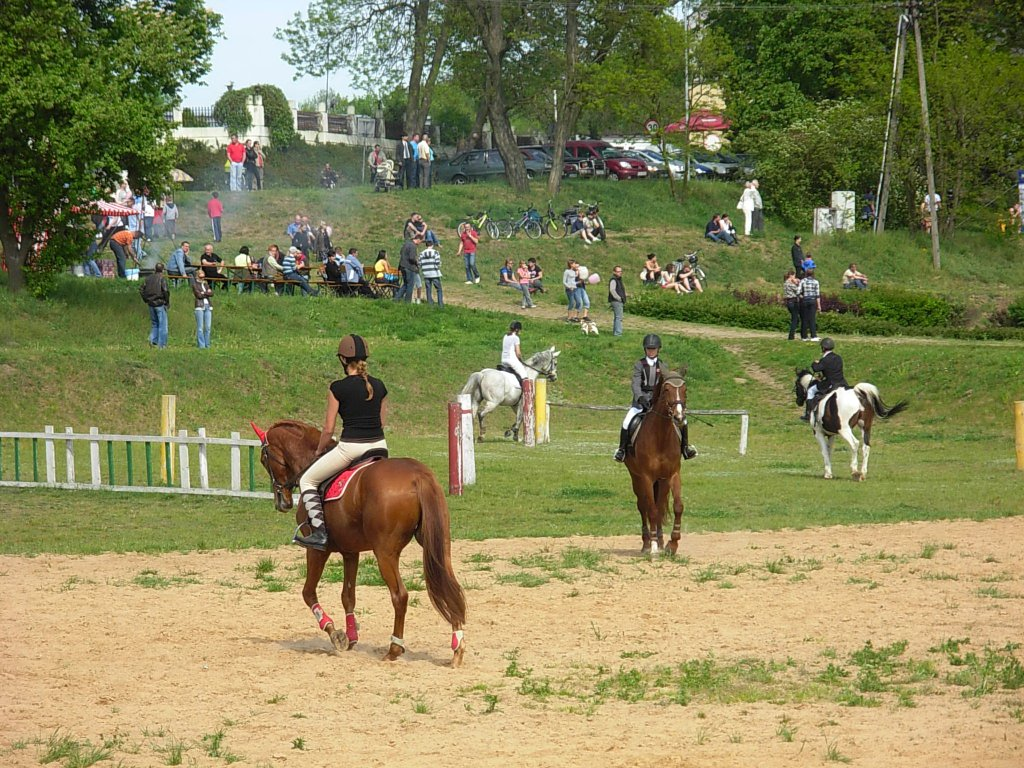 Zawody jeździeckie w Myślęcinku